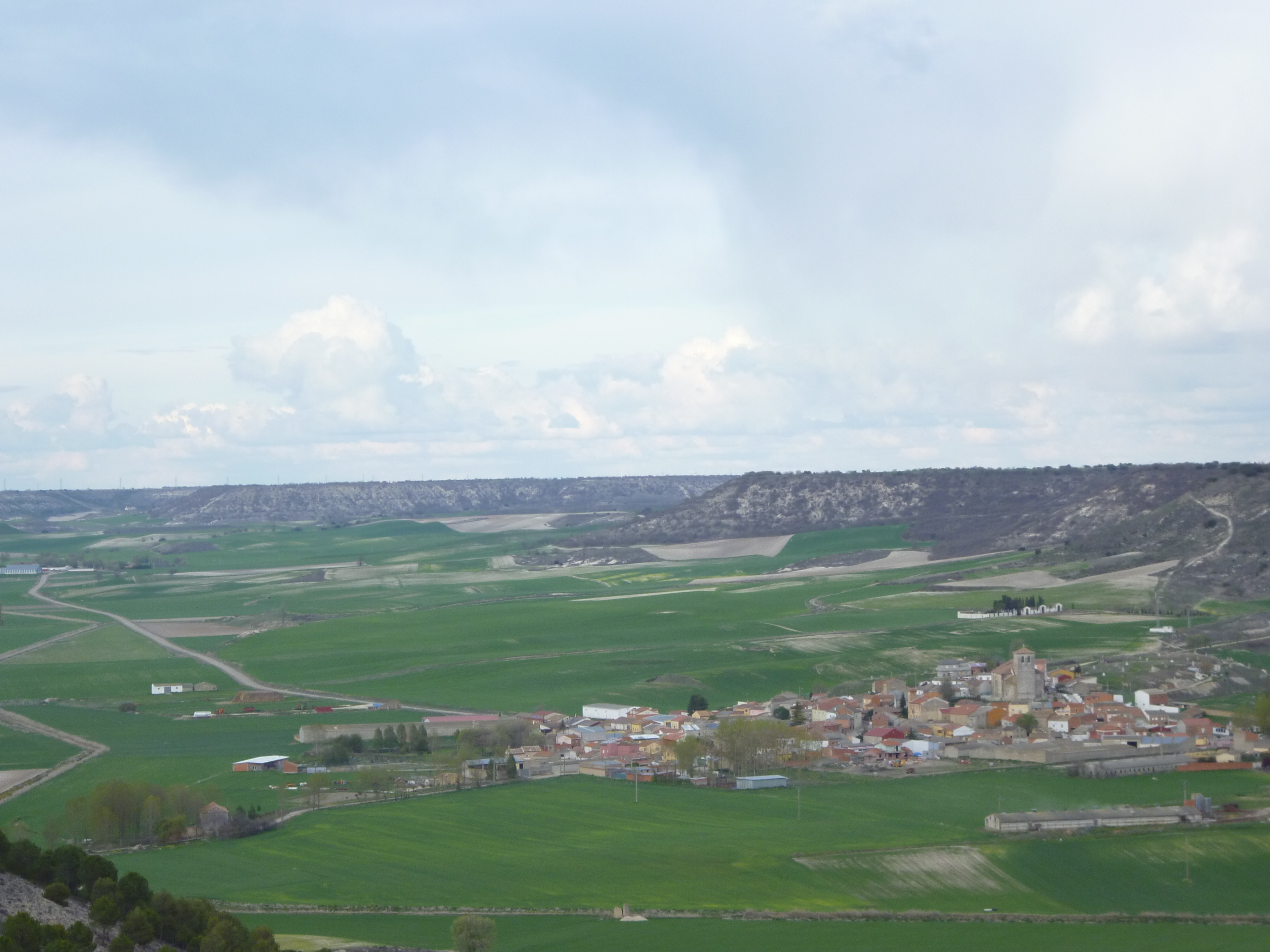 Vista panorámica de Villavaquerín desde el páramo